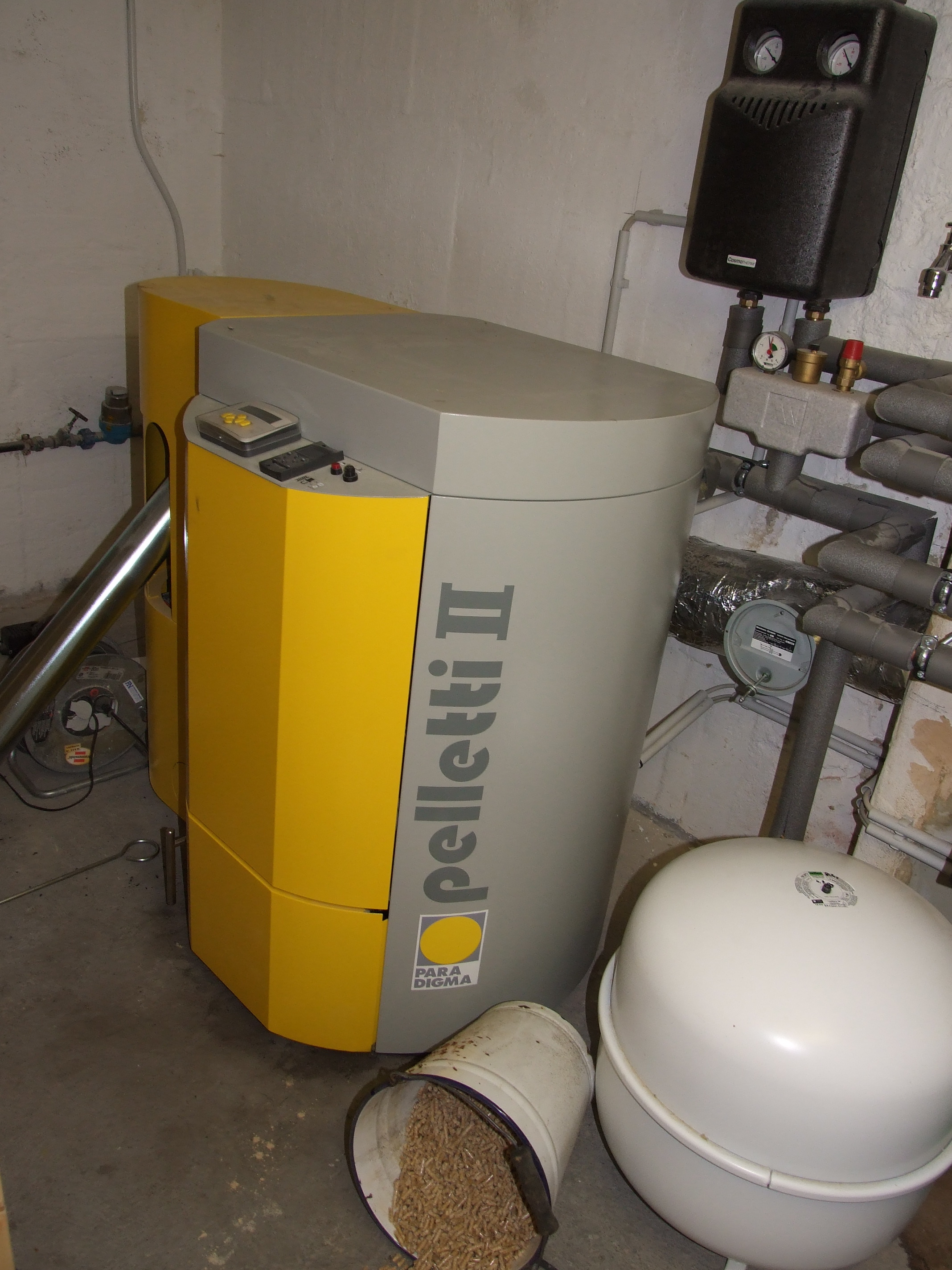 Pelletkessel für Zentralheizung, installiert im Keller eines Wohnhauses. Leitumg: 8 kW, Modell Paradigma Pelleti, BJ 2010.